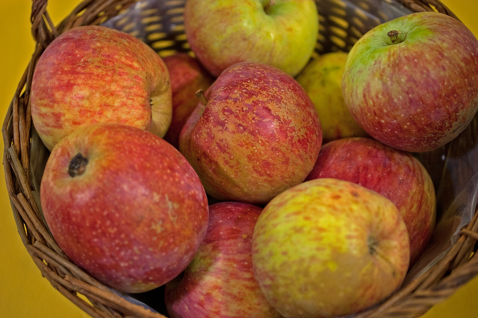 Remo ist eine Apfelsorte, die am Institut für Obstforschung Dresden-Pillnitz entstand und seit 1990 im Handel ist. Die Sorte ist eine Kreuzung aus einem schorfresistenten Zuchstamm des Japanischen Apfels und der Sorte James Grieve.